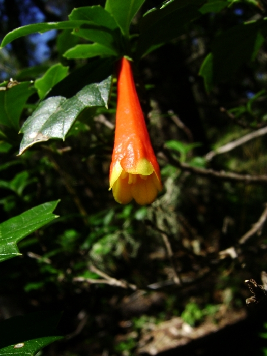 © Pablo Bravo Monasterio sotobosque de bosques subhúmedos de la cordillera de Nahuelbuta